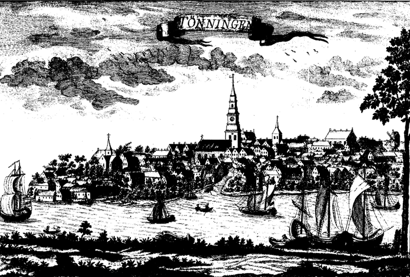 Prospekt af Tønning i Slesvig.